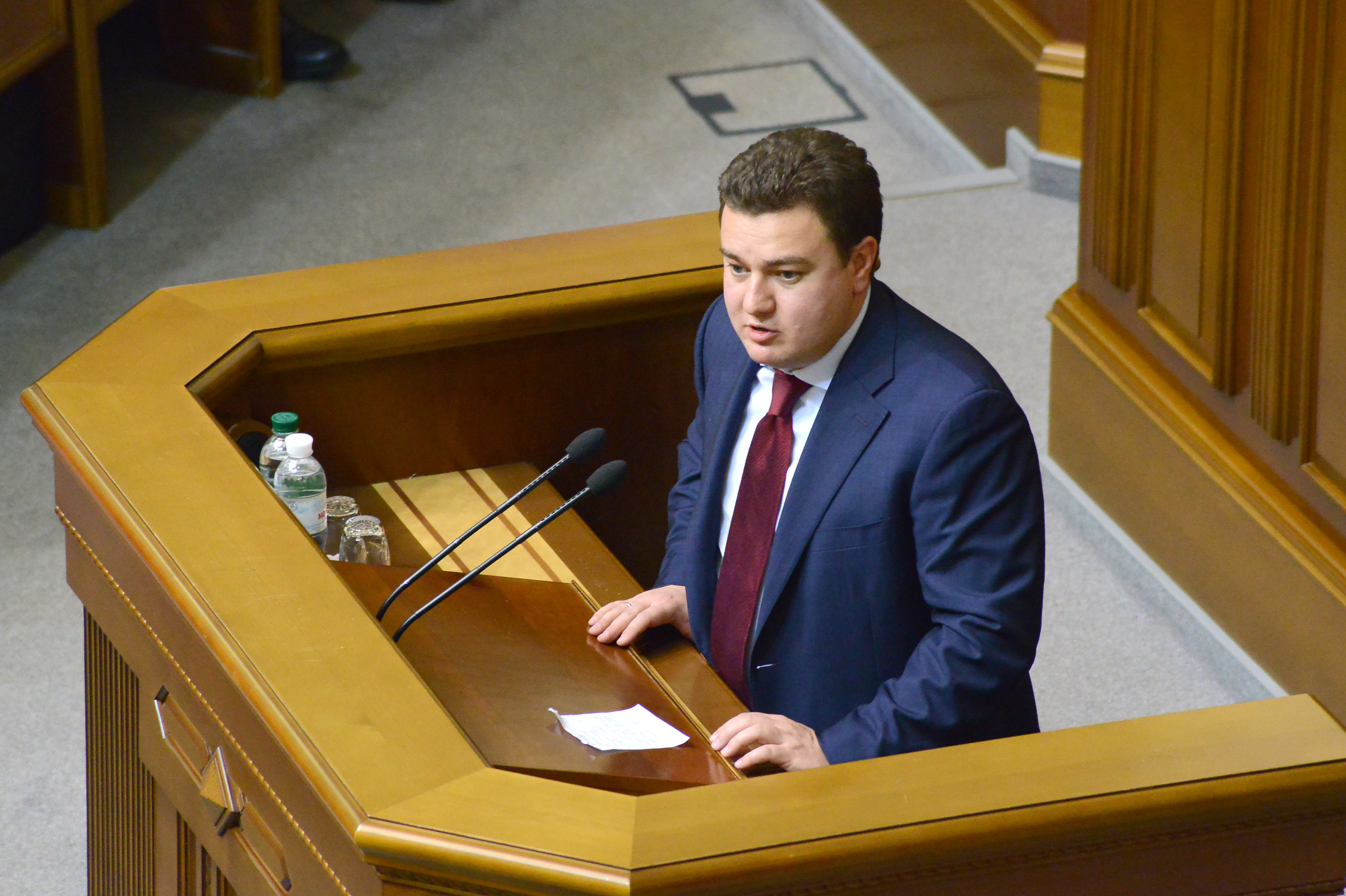 ВЕРХОВНА РАДА УКРАЇНИ 2015 фотограф Вадим Чуприна